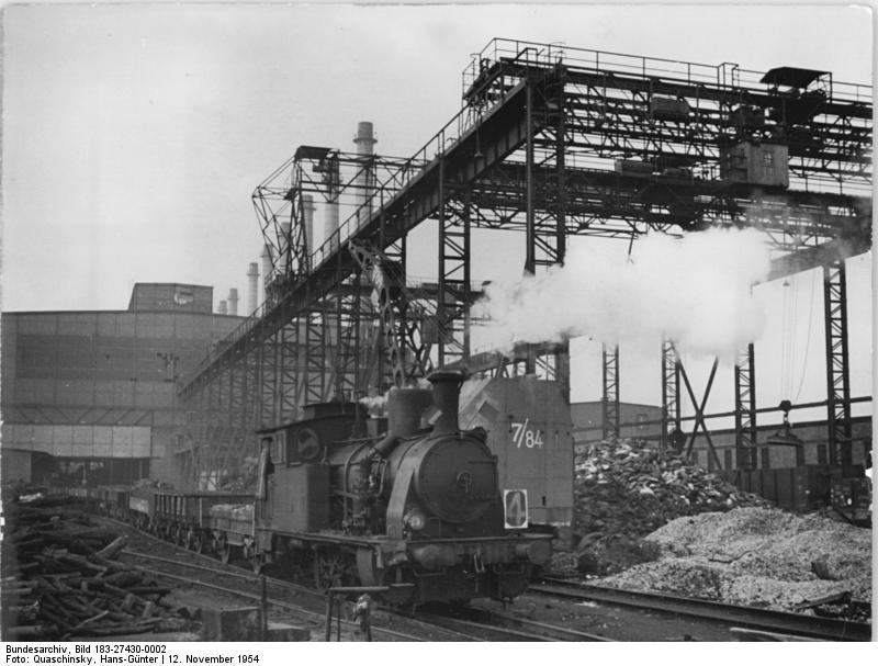 Zentralbild-Quasch Hein-Qu 8 Mot. 12.11.1954 VEB Stahl- und Walzwerk Brandenburg-Havel Blick auf einen der Schrottplätze mit Krananlage. Im Hintergrund das Siemens-Martin-Stahlwerk. (Aufgenommen Anfang November 1954)